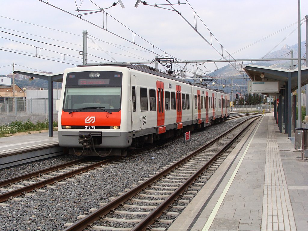 El automotor eléctrico 213.79 de FGC en la estación de Olesa de Montserrat.